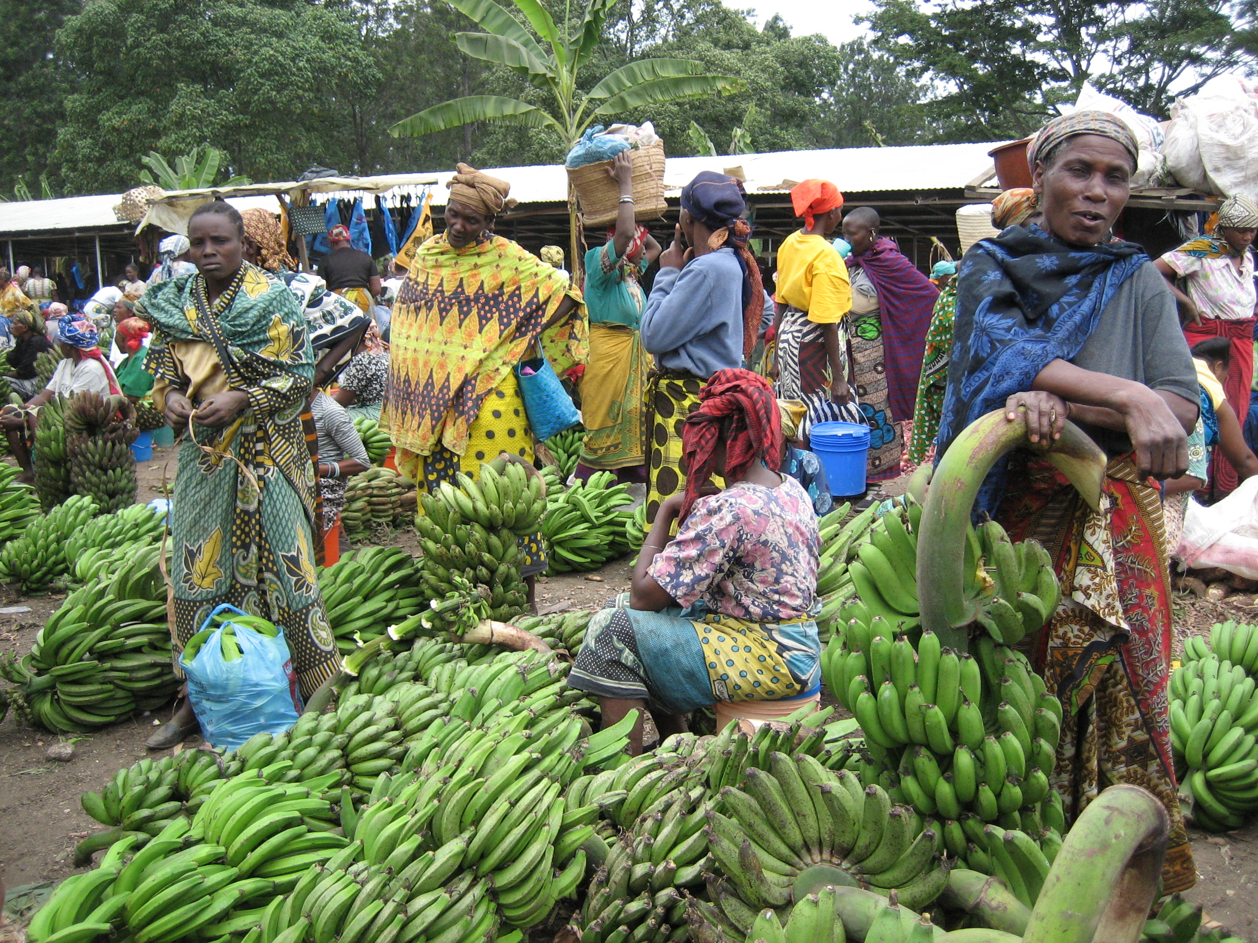 Tengeru market near Arusha, Tanzania